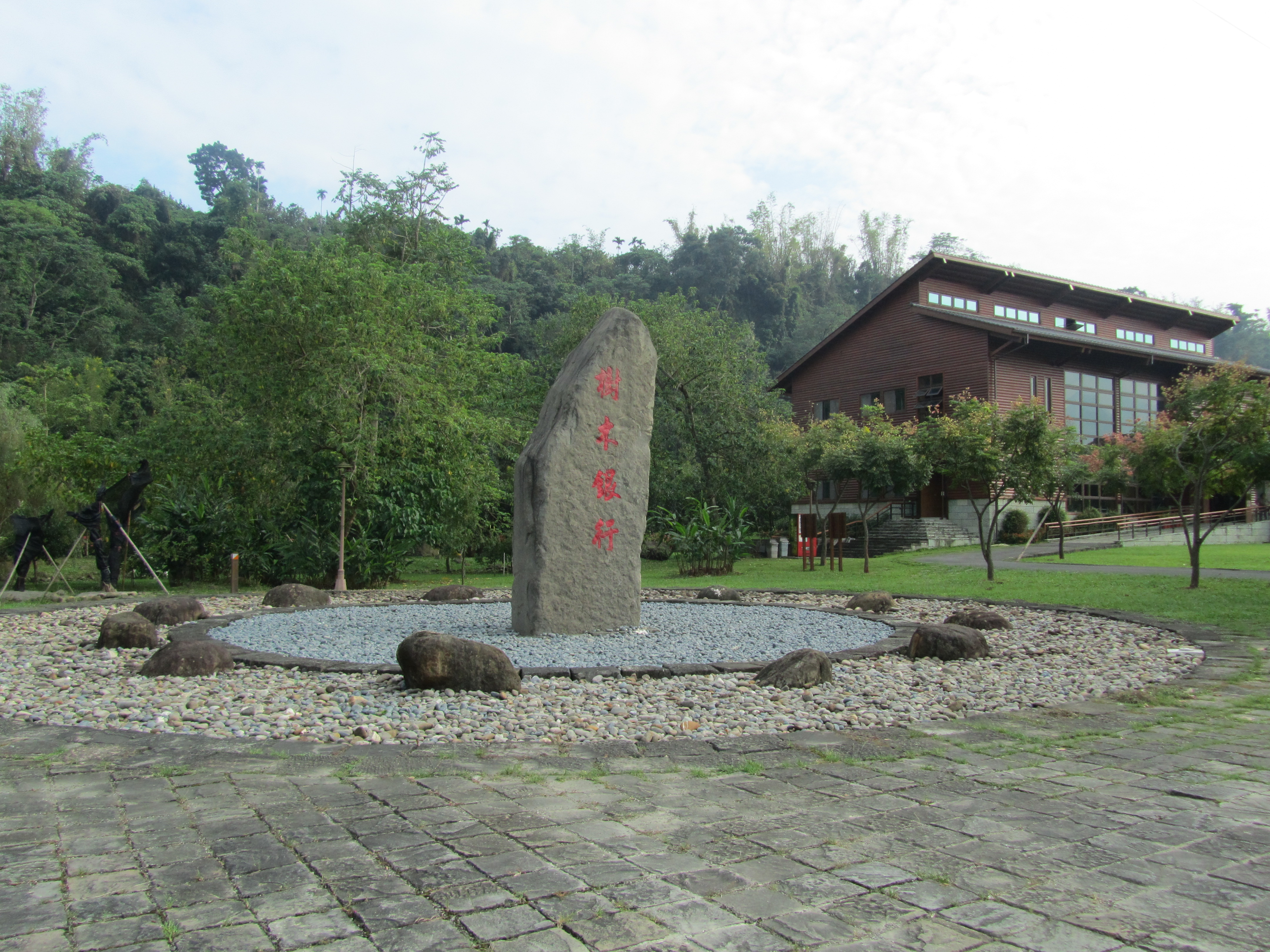 觸口樹木銀行